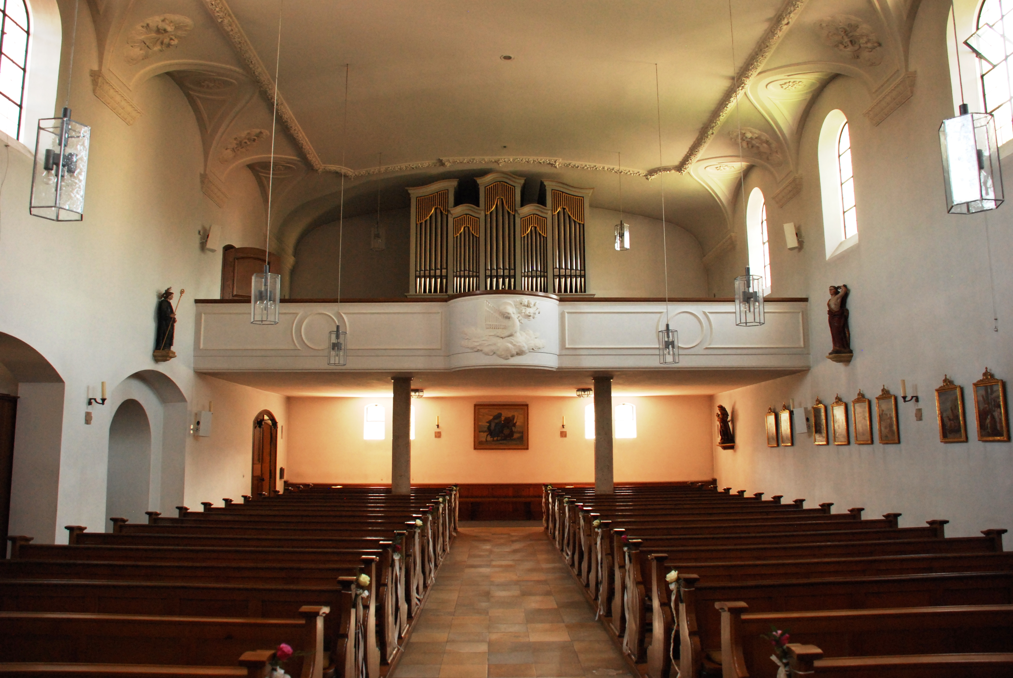 Empore der denkmalgeschützten katholischen Pfarrkirche "St. Peter und Paul" in Aschheim, Landkreis München